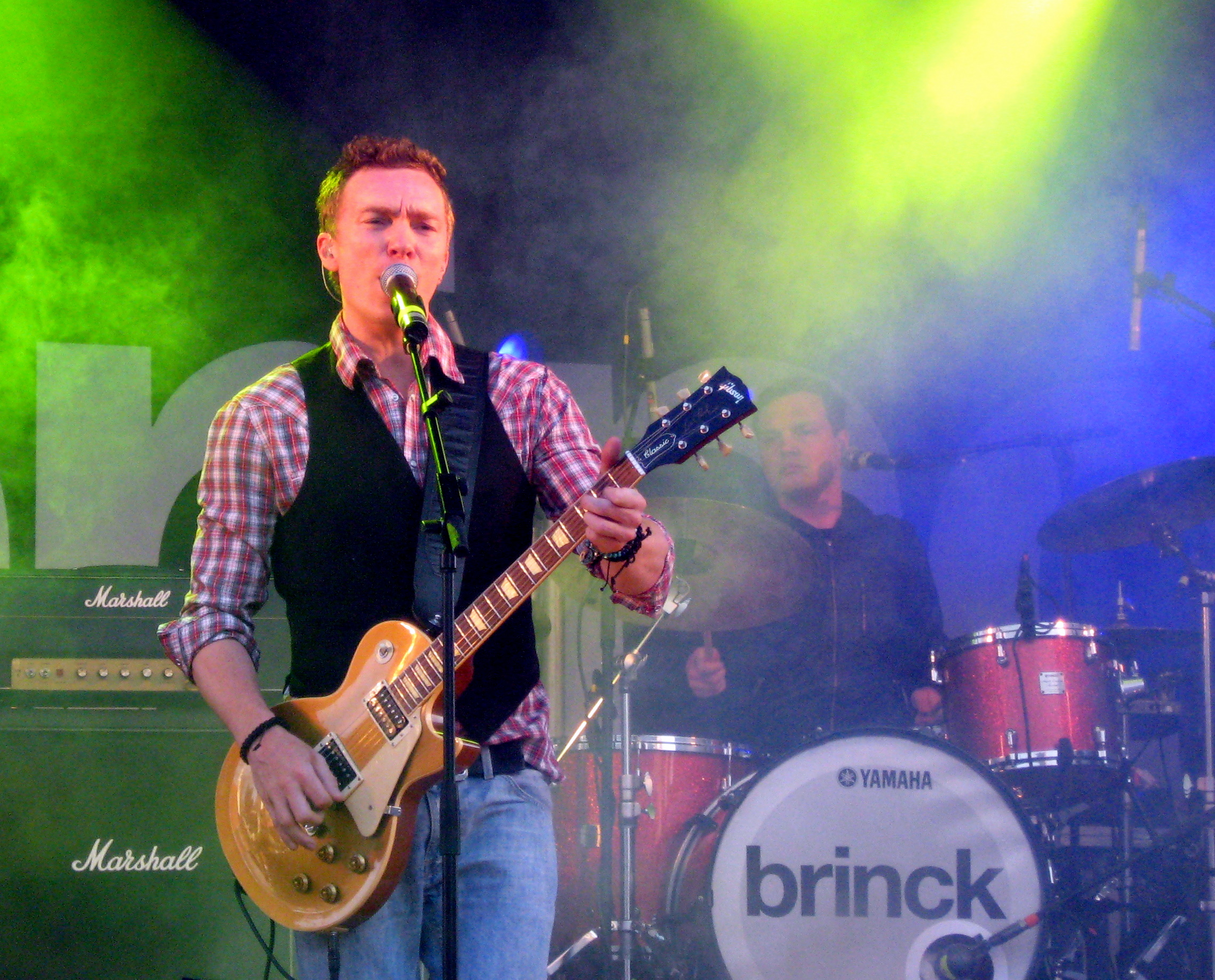 Brinck i Hjørring, juni 2009